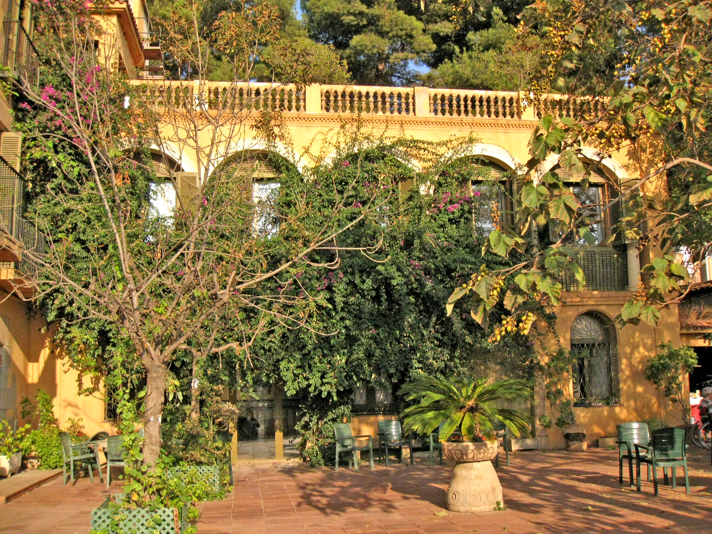 Can Mora, al carrer del Portell núm. 11-13 a la cruïlla amb el camí de Can Mora, al barri del Carmel (Barcelona). Antiga masia del 1750, tal com indica a la llinda del portal d'entrada. Té un cos afegit perpendicularment a la façana, amb arcades, que configura un pati juntament amb l'edifici principal. Vista de les arcades del pati.